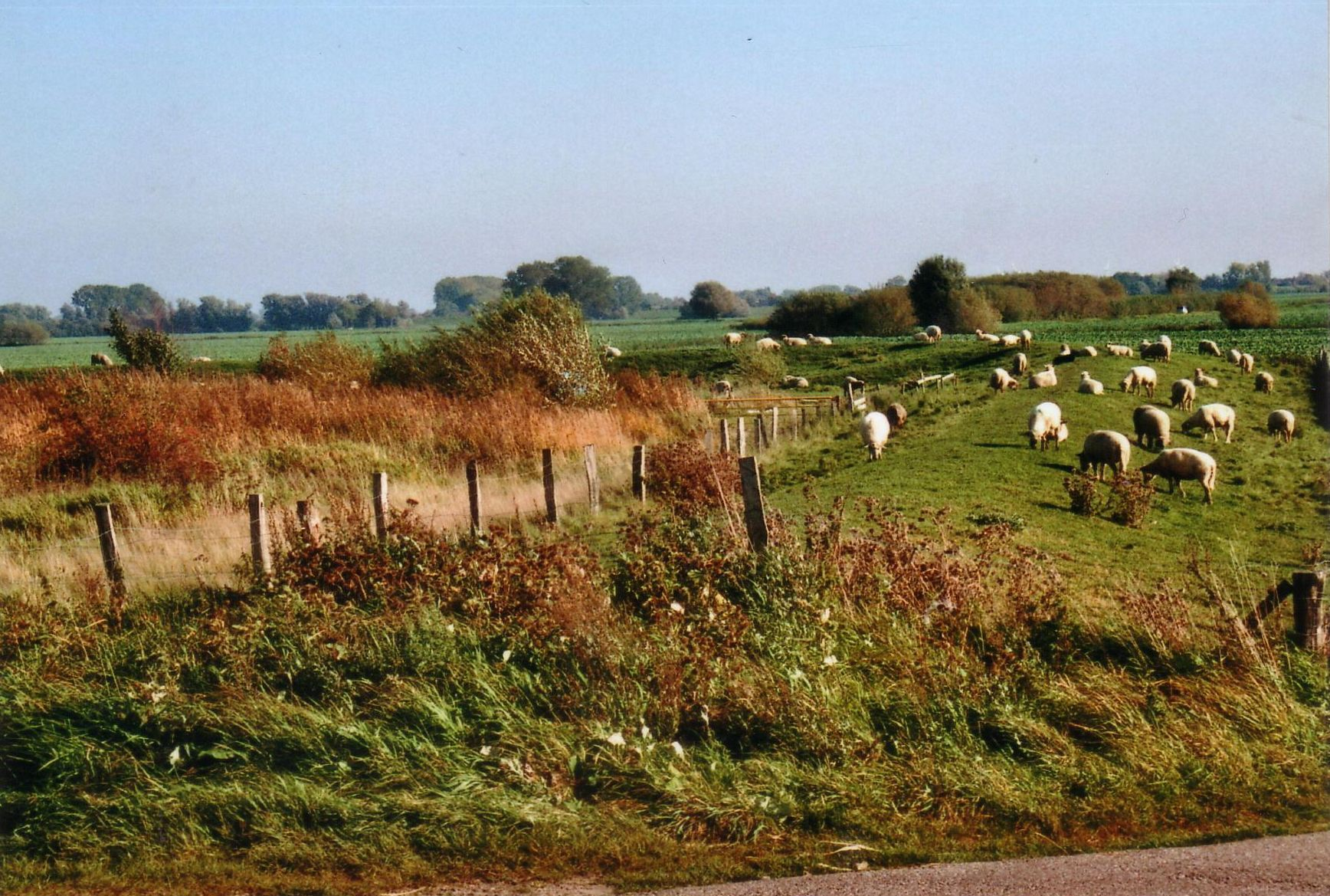 Landschaft der Elbmarsch bei Seestermühe, Kreis Pinneberg, Schleswig-Holstein